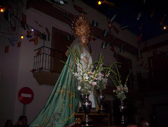 foto de la procesion de la virgen de montesion lucainena de las torres